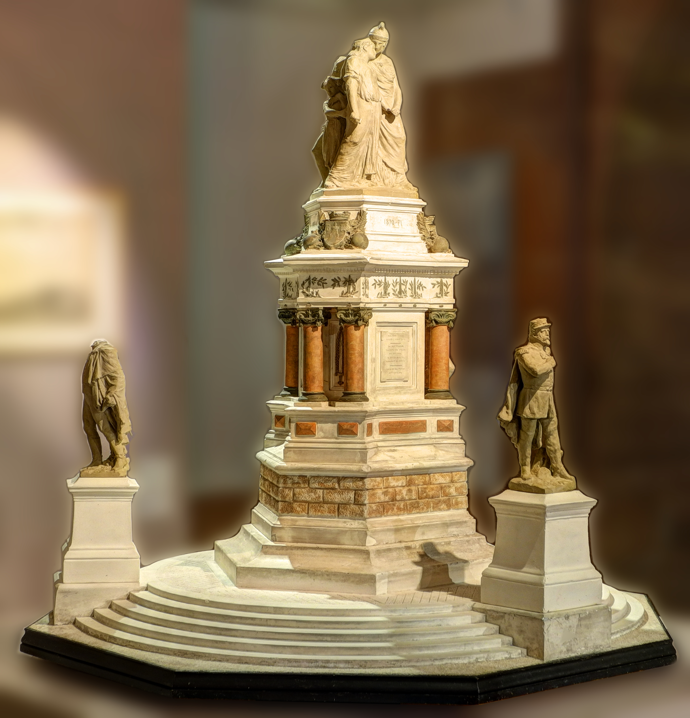 Musée d'Histoire : Maquette pour le monument des Trois Sièges (HDR). Frédéric-Auguste Bartholdi (1834 - 1904). 1880, plâtre polychorme N° inv. : 2010.1.1, Musées de Belfort